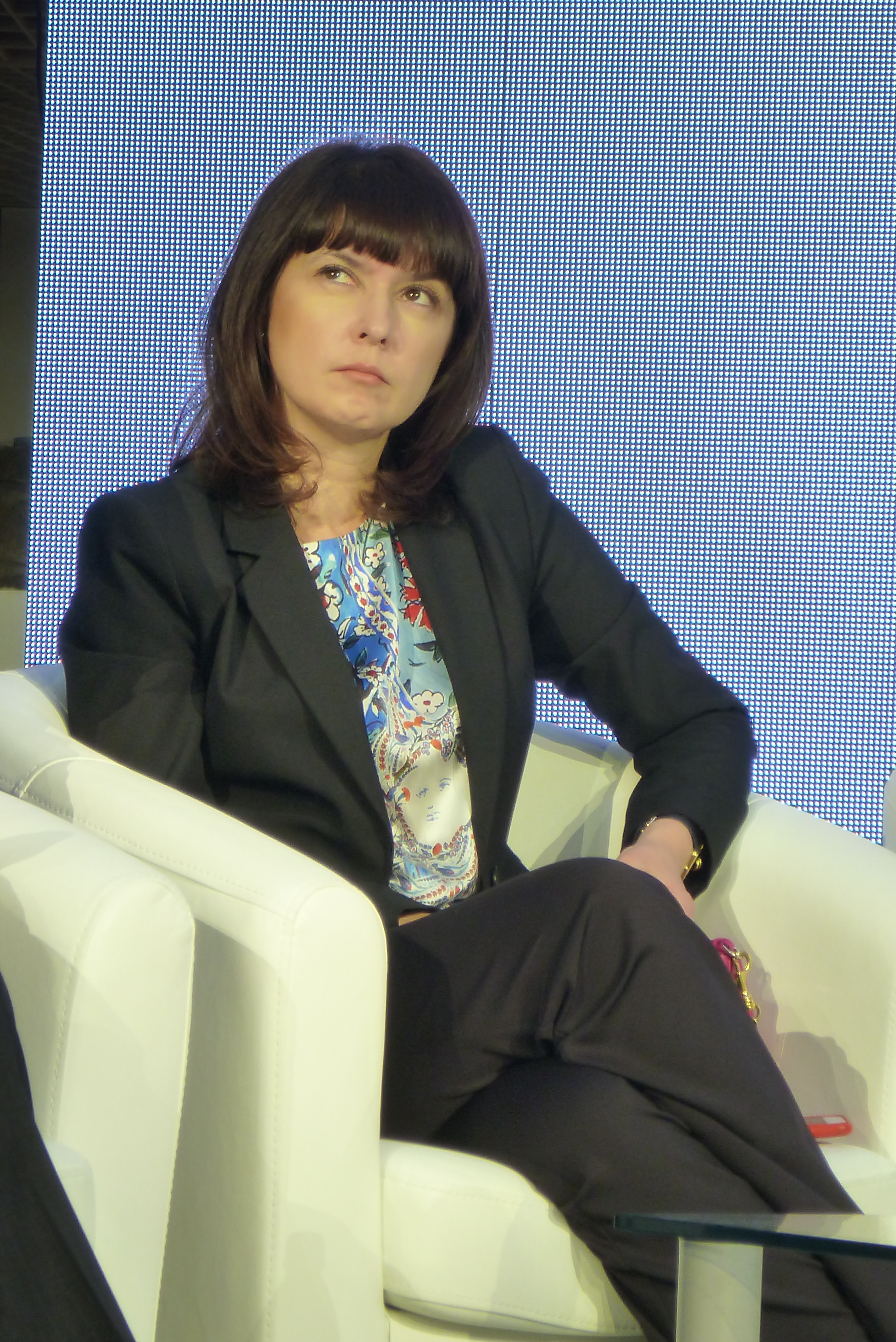 Элеонора Расулова, 23 ноября 2018 года на IX Уральском медиафоруме